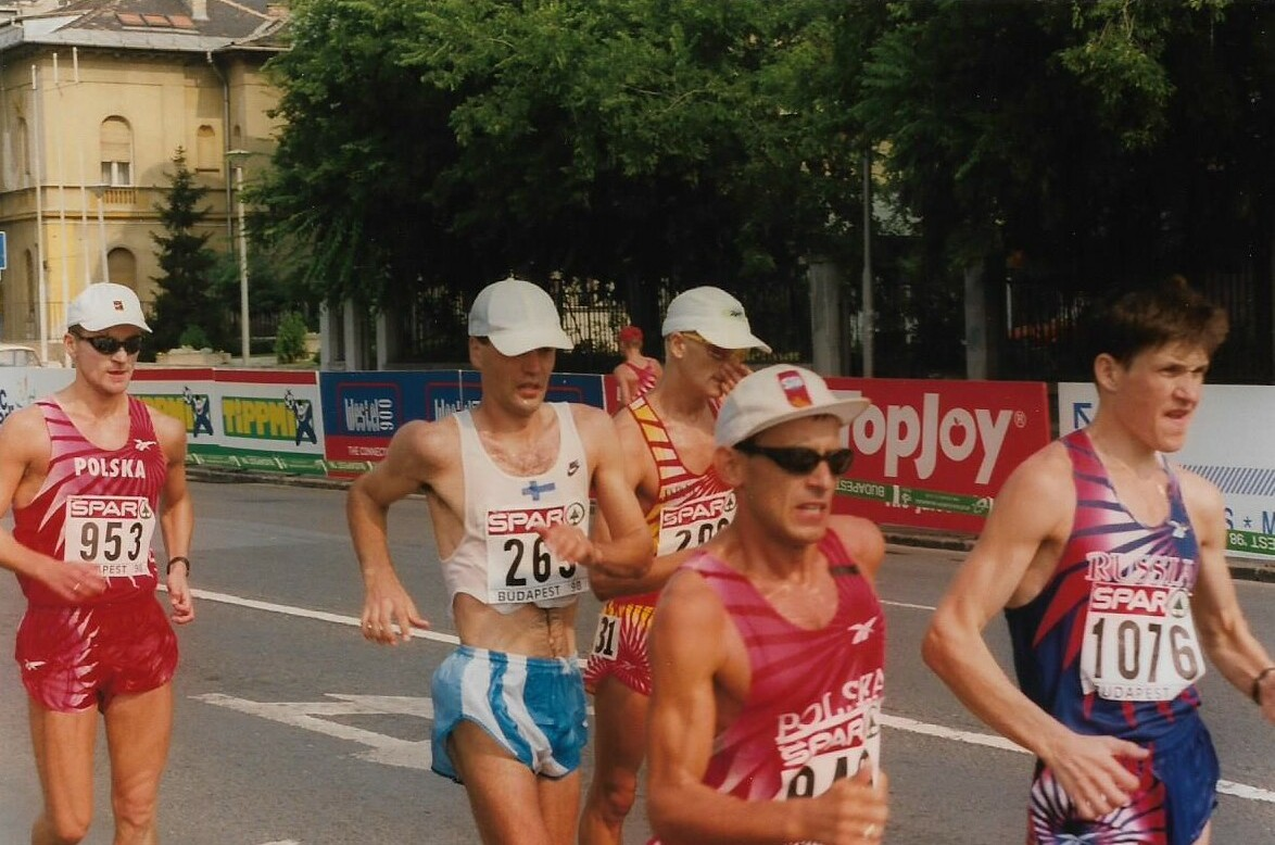 Tomasz Lipiec (953), Valentin Kononen (269), Santiago Perez (209), Robert Korzeniowski (949) ja Oleg Ishutkin (1076) 50 kilometrin kävelyn kärjessä yleisurheilun EM-kilpailuissa Budapestissa 21. elokuuta 1998.